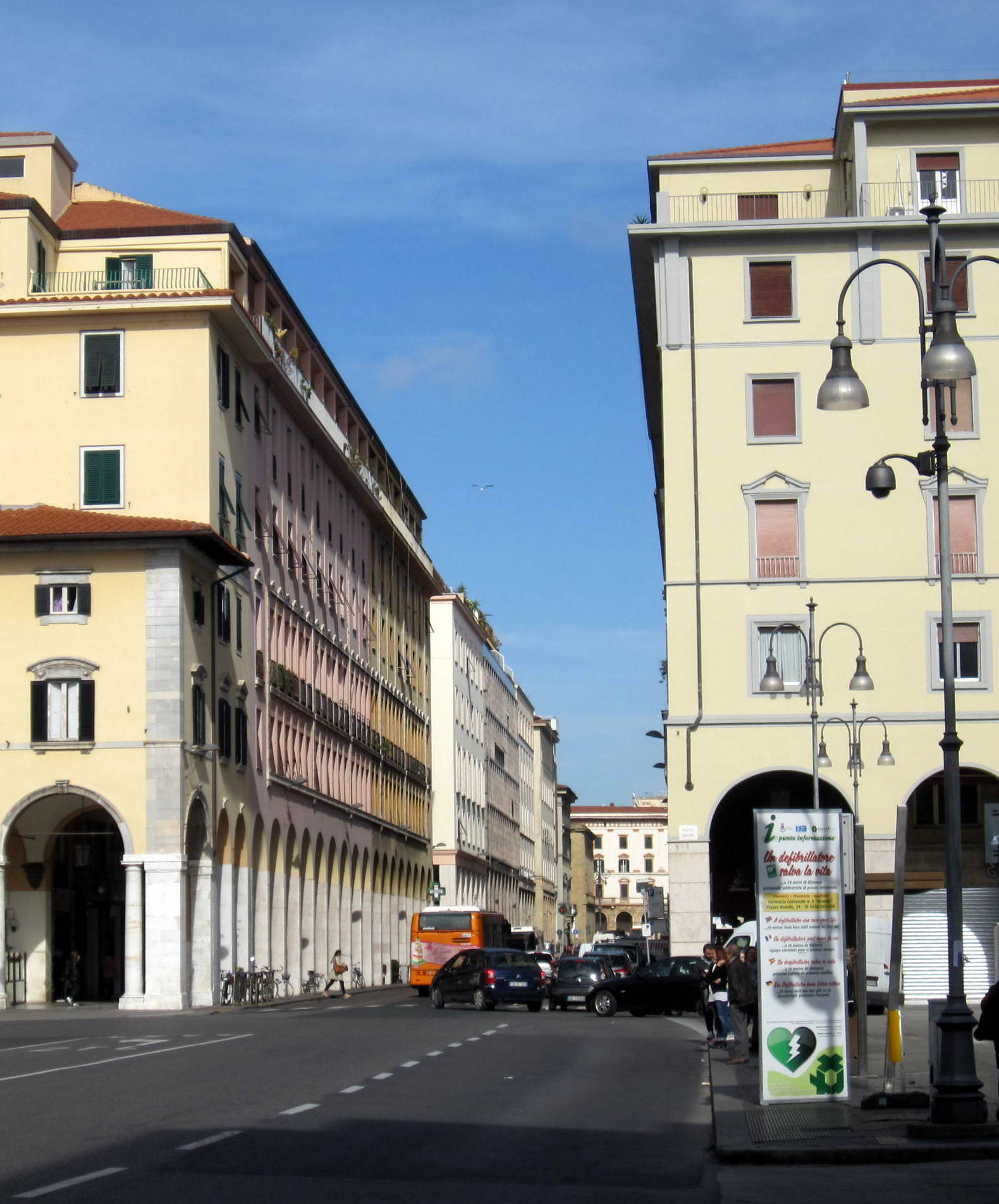 Via Grande a Livorno